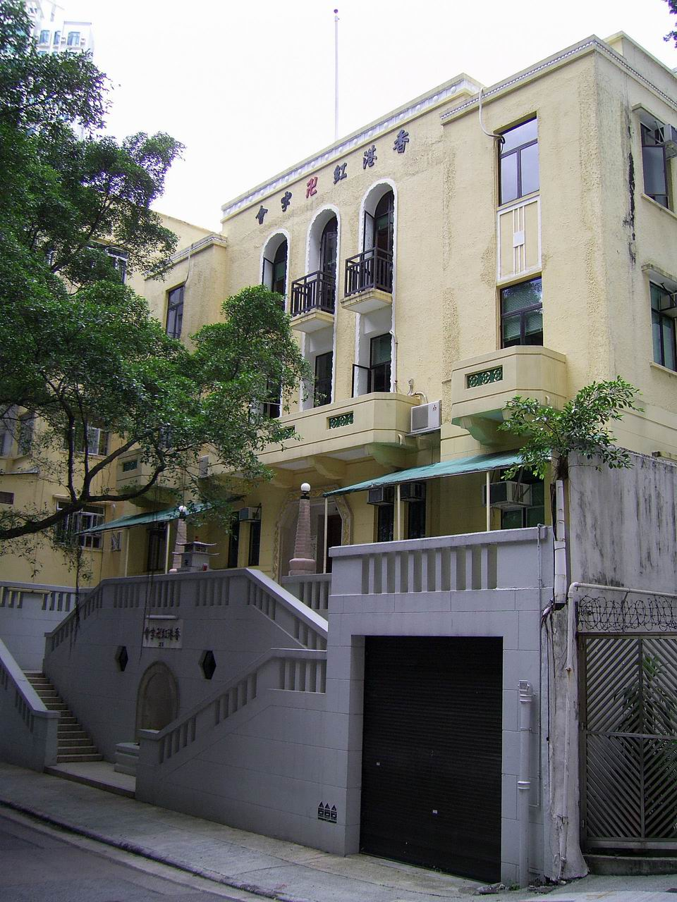 中文（香港）: 香港红卍字會